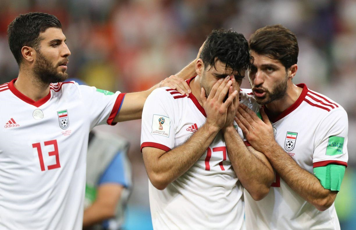 نیمه دوم بازی تیم‌های فوتبال ایران و پرتغال در جام جهانی ۲۰۱۸